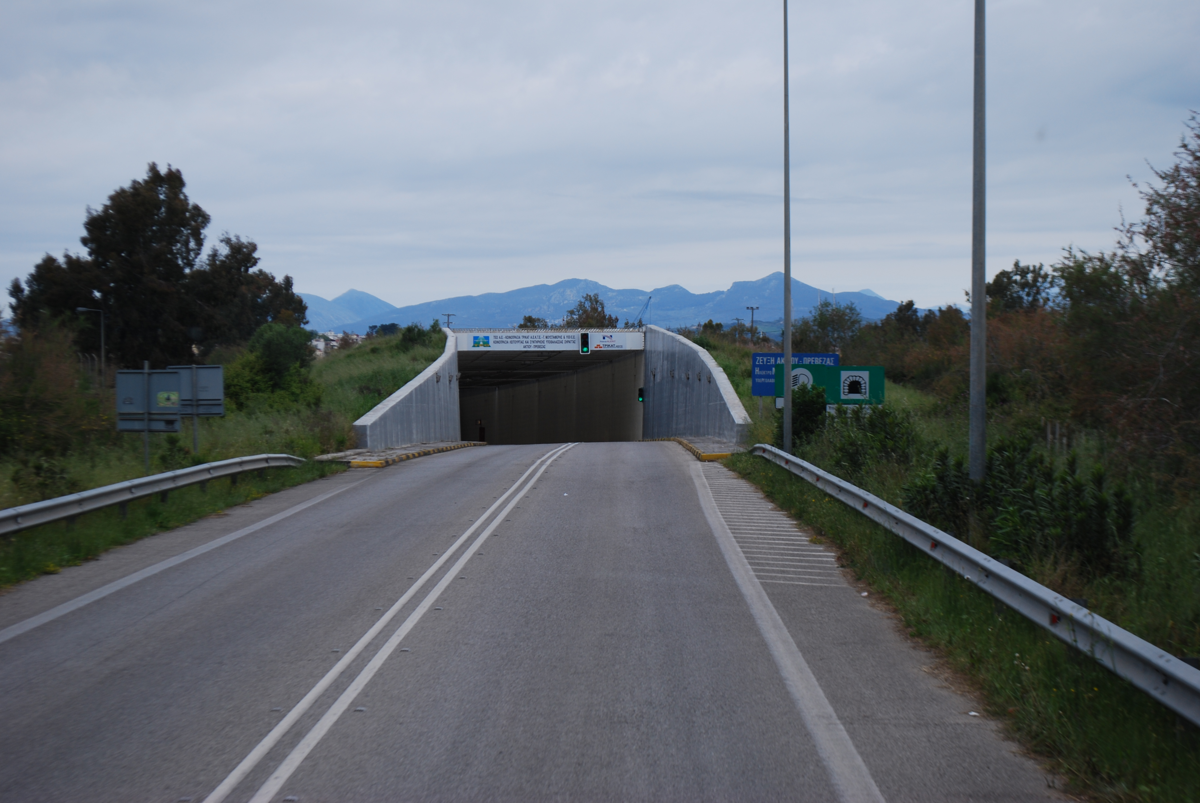 Vue du tunnel sous-marin Actio-Preveza.